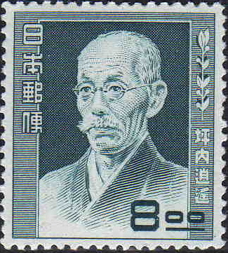 文化人切手として発行された、文学者の坪内逍遥を描く切手。